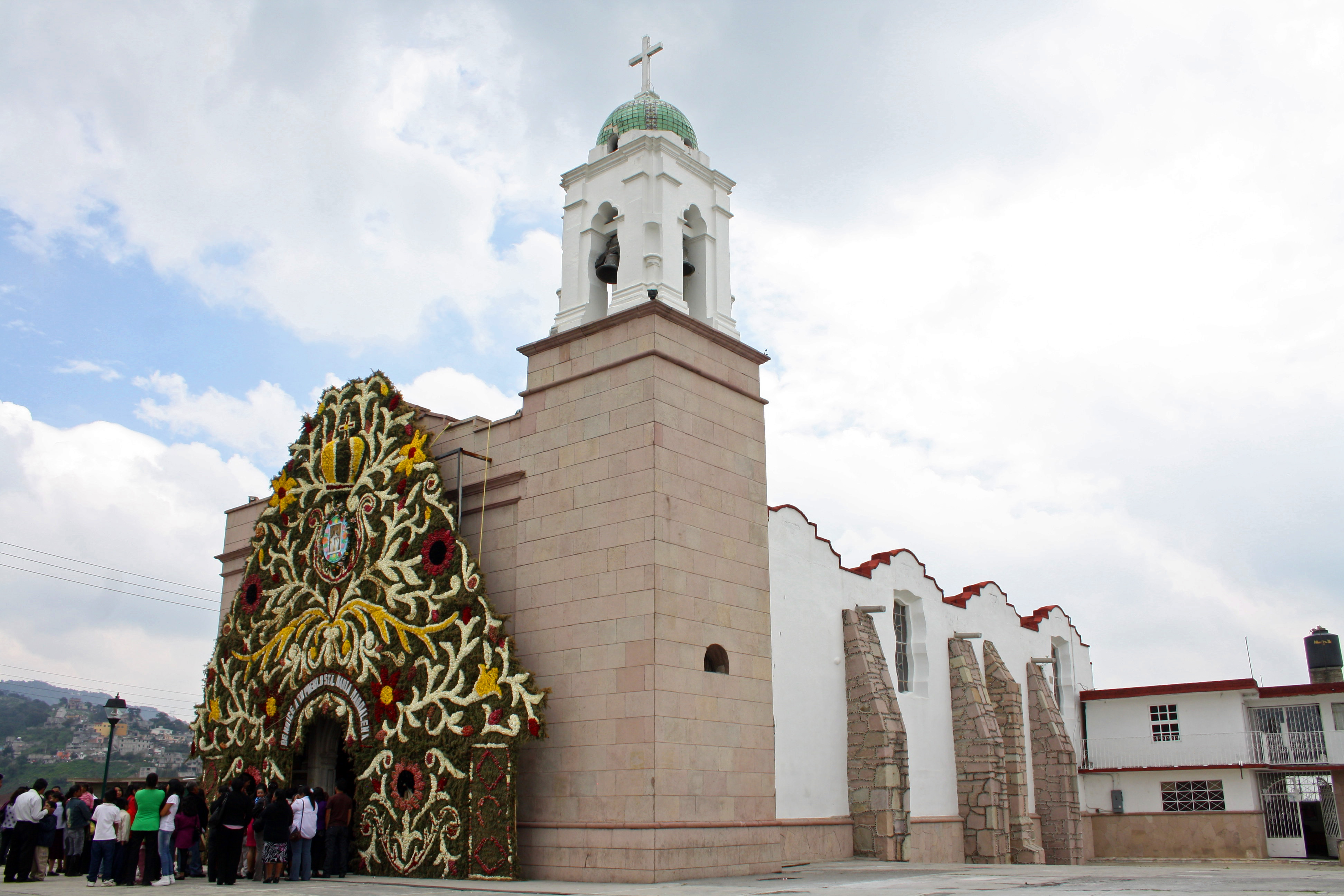 Parroquia de Santa María Magdalena, pueblo de La Magdalena Chichicaspa, en el municipio de Huixquilucan, Estado de México